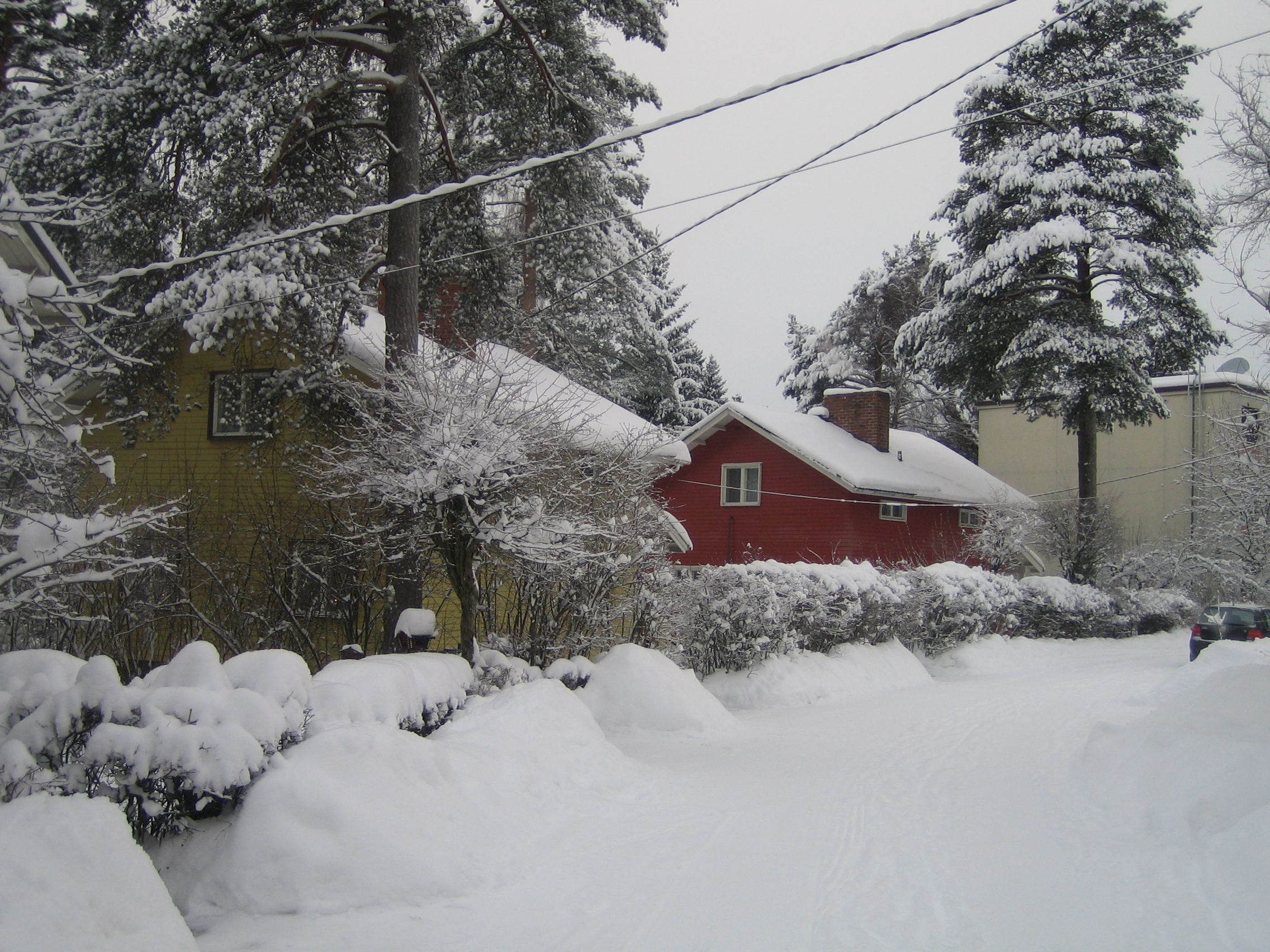 Rintamamiestaloja Jaakkimantiellä Espoon Laajalahdessa.